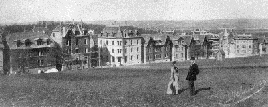 Der Bankier und Sozialreformer Eduard Pfeiffer und seine Frau Julie 1895 vor der noch im Bau befindlichen Stuttgarter Arbeitersiedlung Kolonie Ostheim.